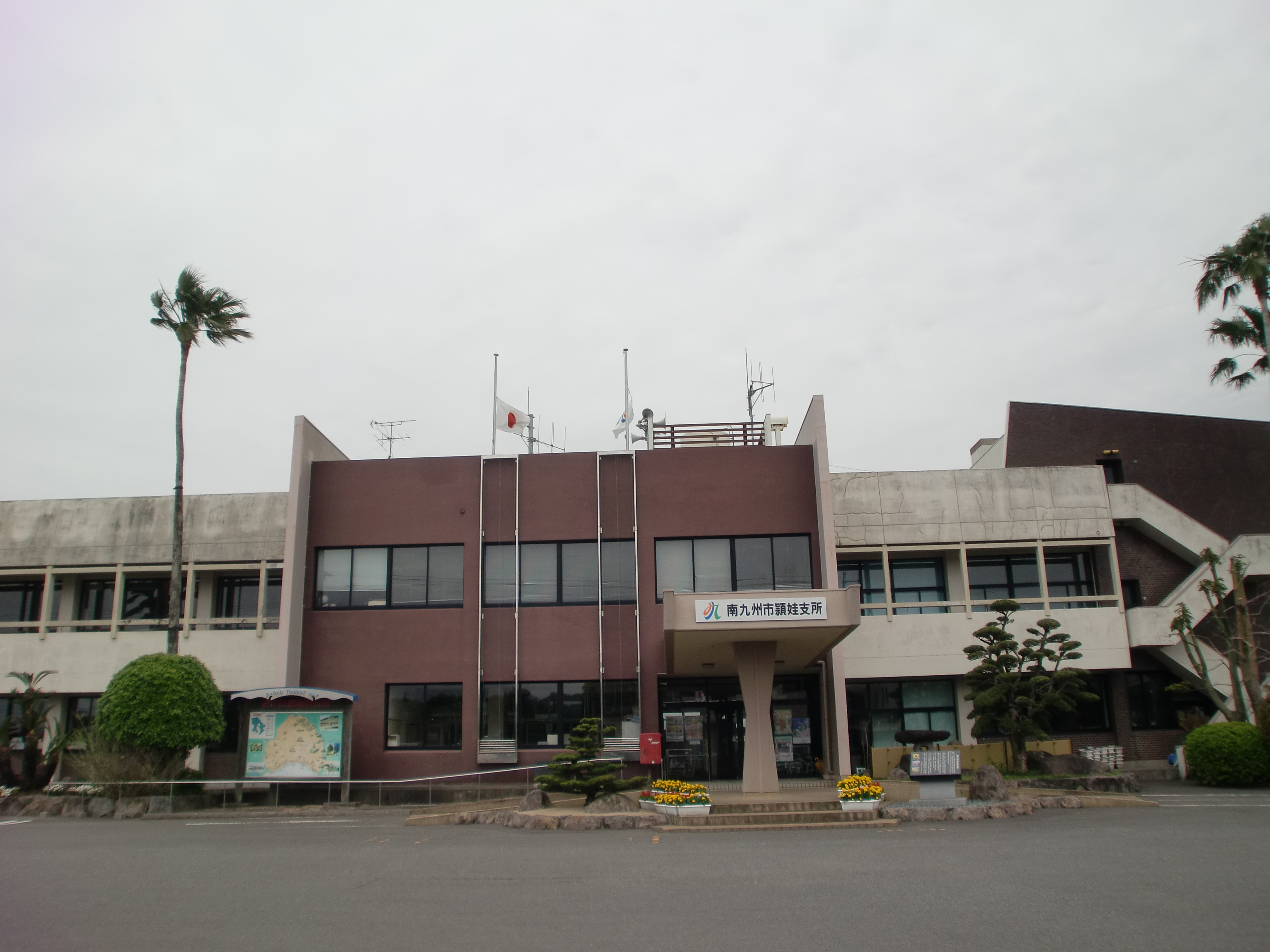 南九州市役所頴娃支所（旧頴娃町役場）の外観。